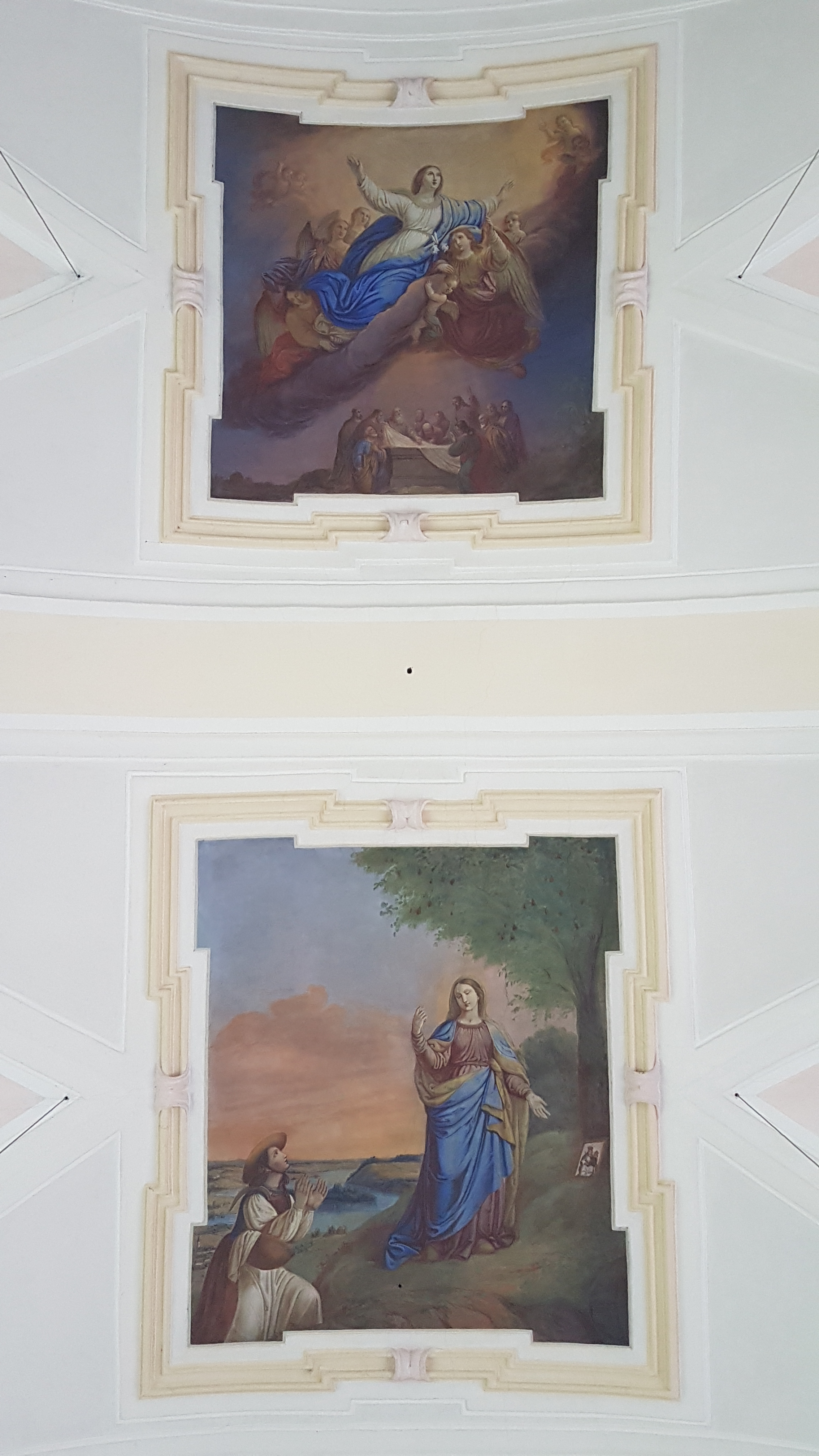 Mariä Heimsuchung (Mühlberg, Waging am See)